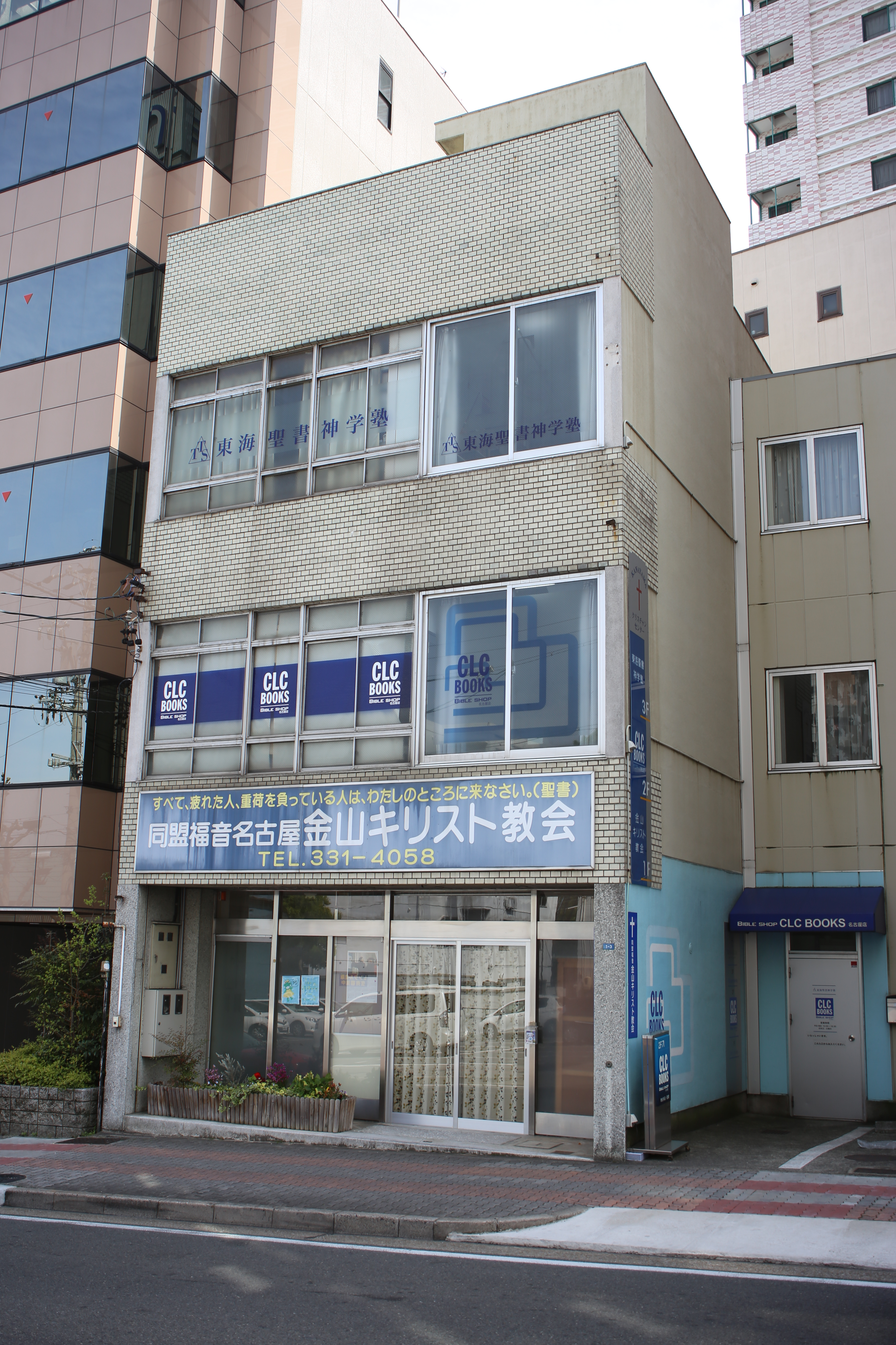 名古屋市中区金山二丁目の名古屋金山キリスト教会